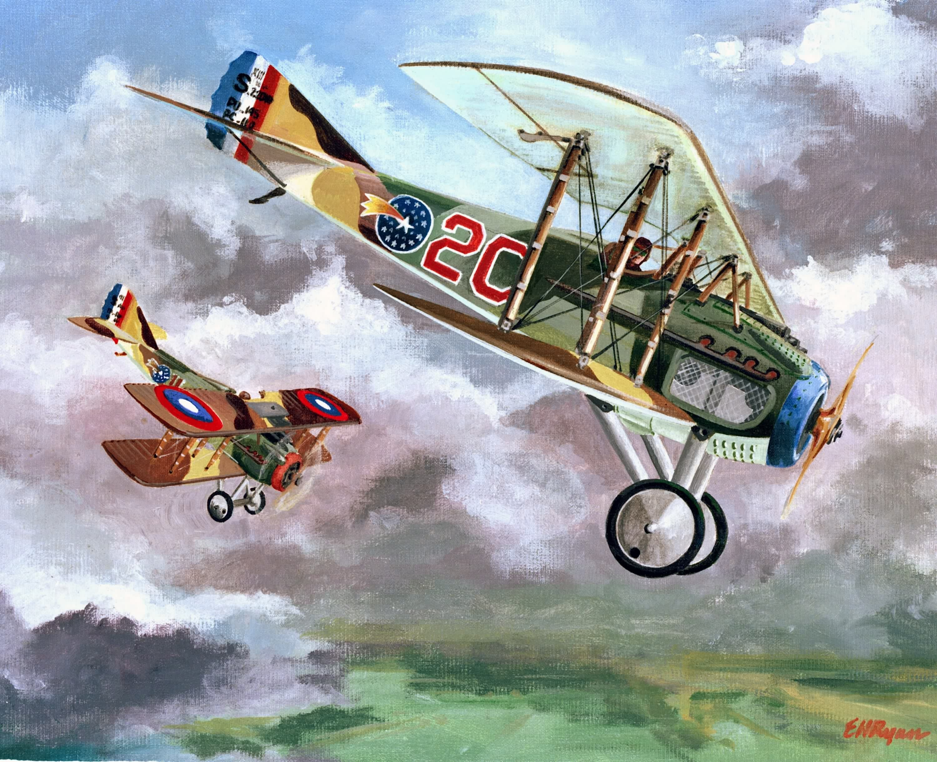 Artwork: "USAAS Spads of 22nd Aero Squadron" France 1918.